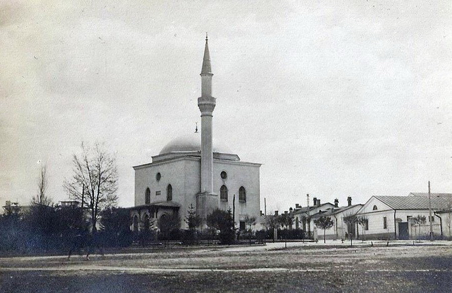 Мечеть Драгунского конного полка 1910-1930. Мечеть «Валиде Шериф» («Мать народов»). Симферополь